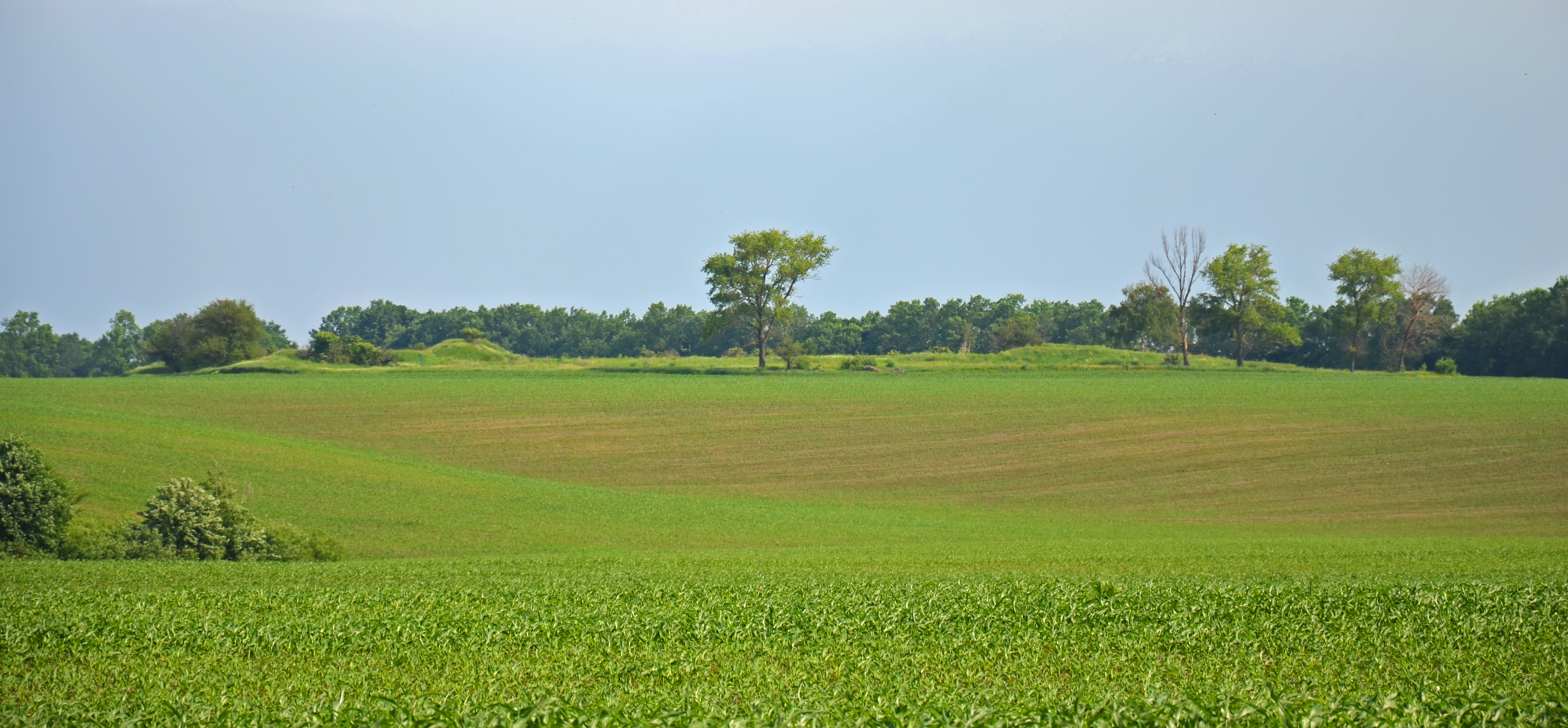 «Вибла могила», Баришівський район, Семенівська сільська рада